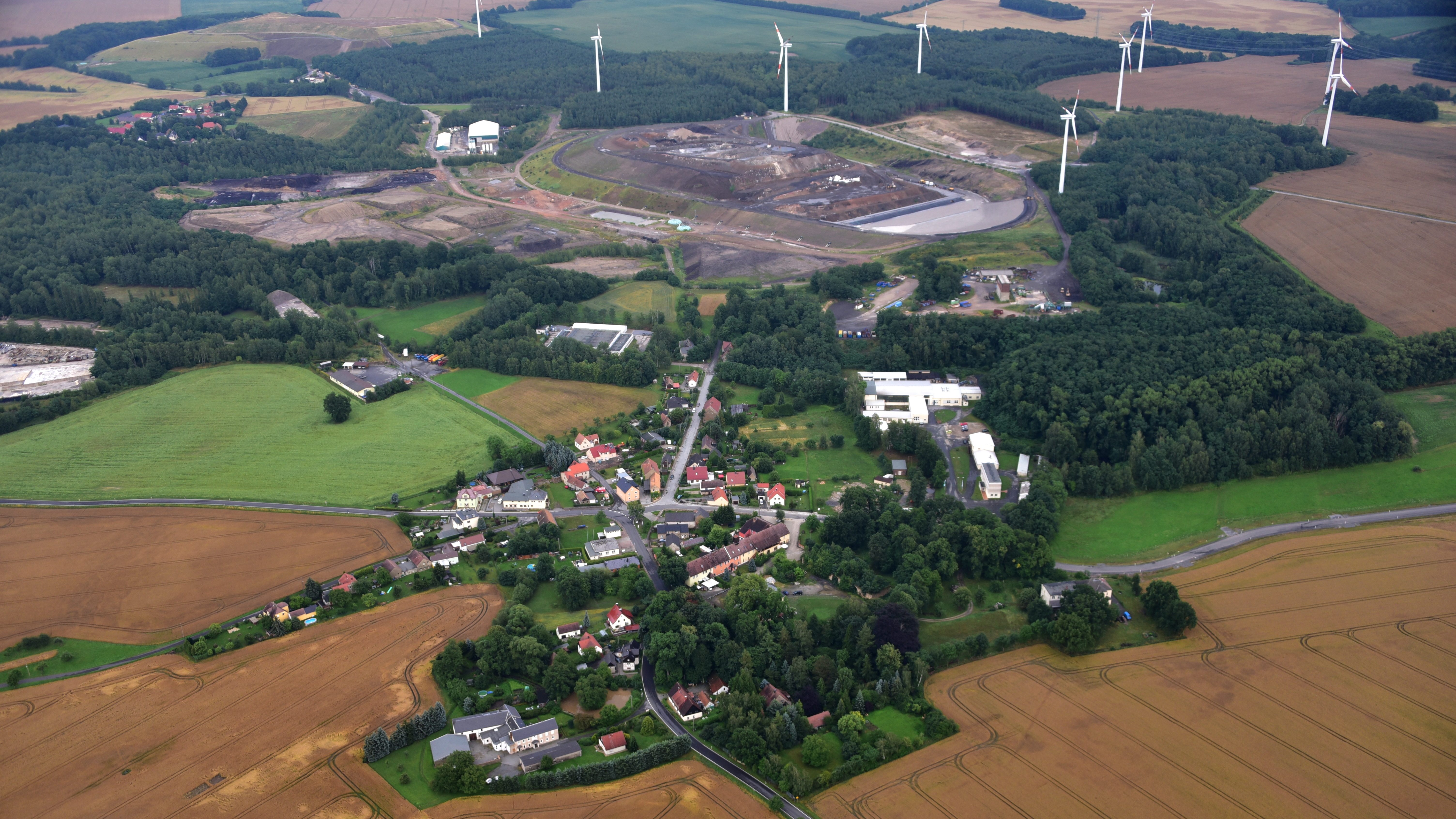 Puschwitz, Luftaufnahme (2017) Hornjoserbsce: Powětrowy wobraz Bóšic z Wětrowskej deponiju w pozadku (2017)